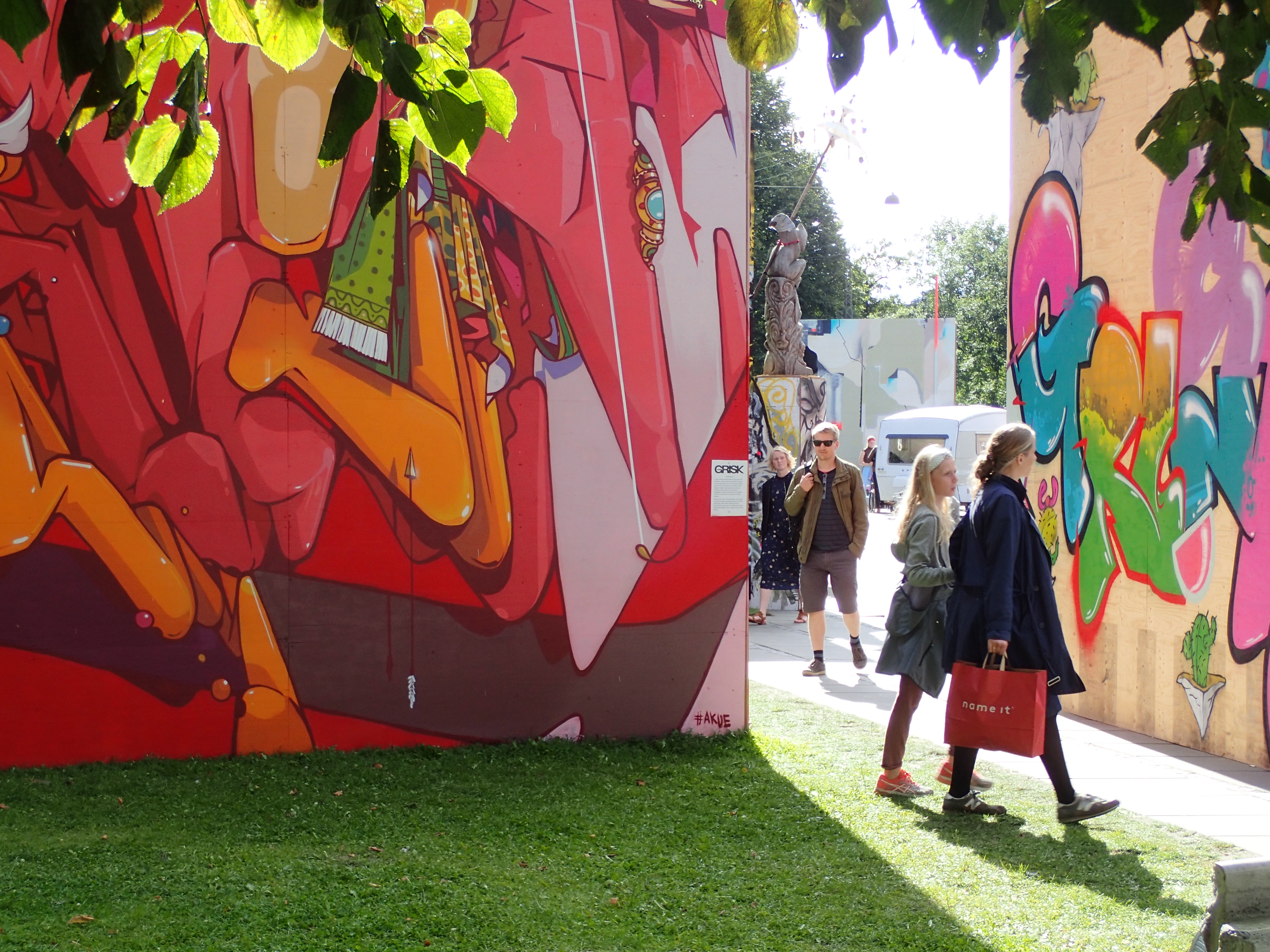 Aarhus Streetart Festival i Byparken, Aarhus Festuge.